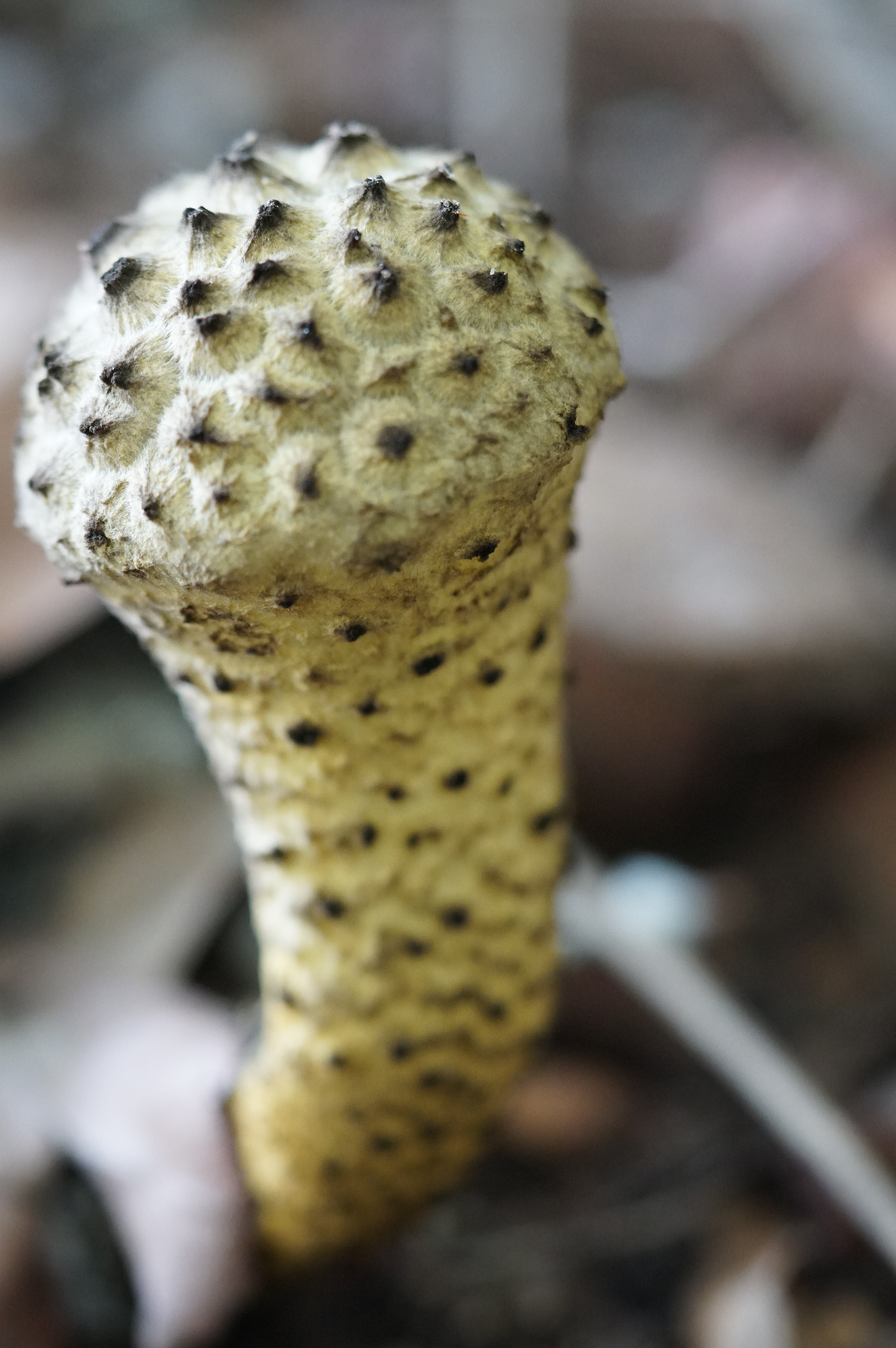 Afroboletus luteolus_Kota